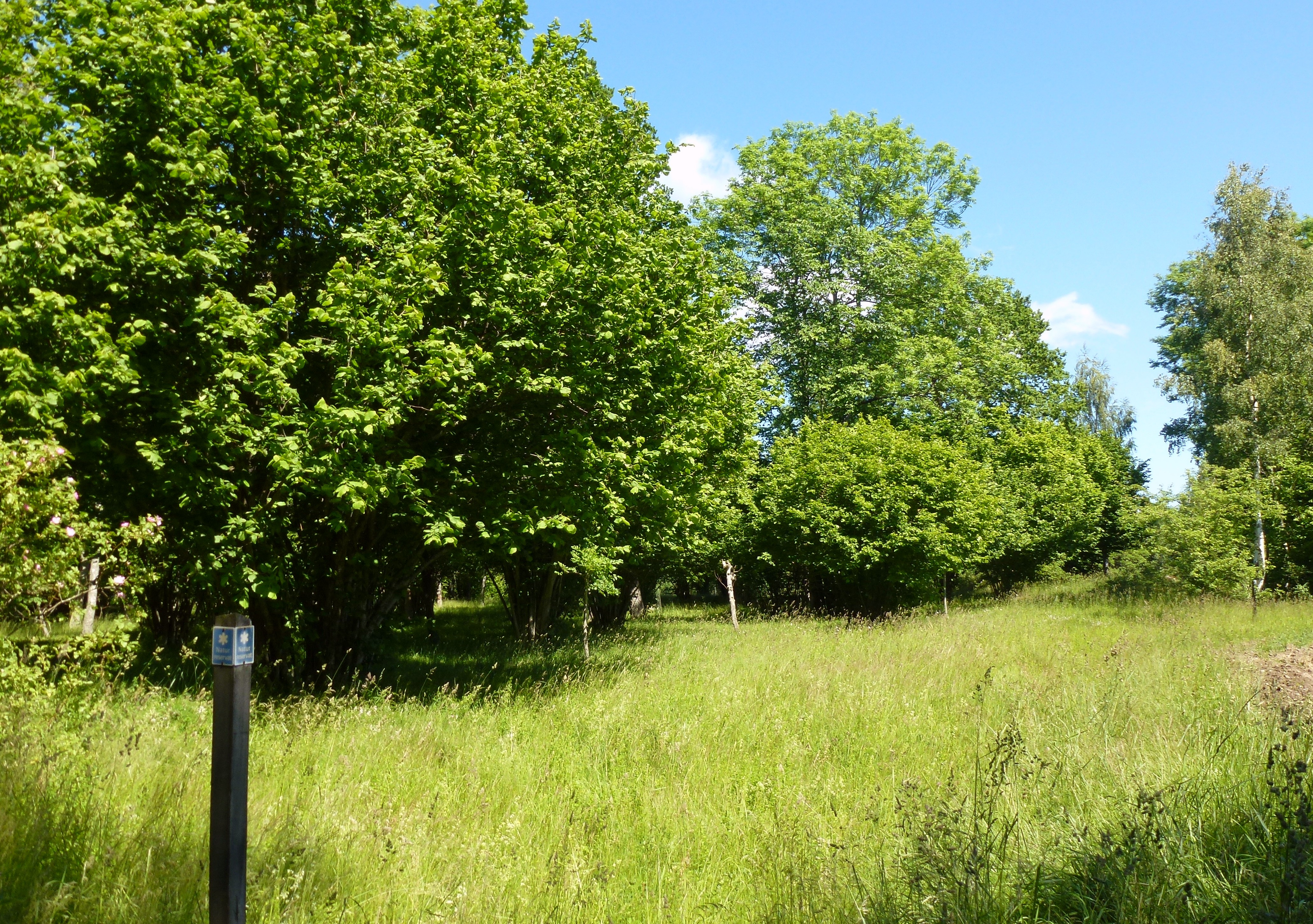 Hörningsnäs naturreservat, lövängen